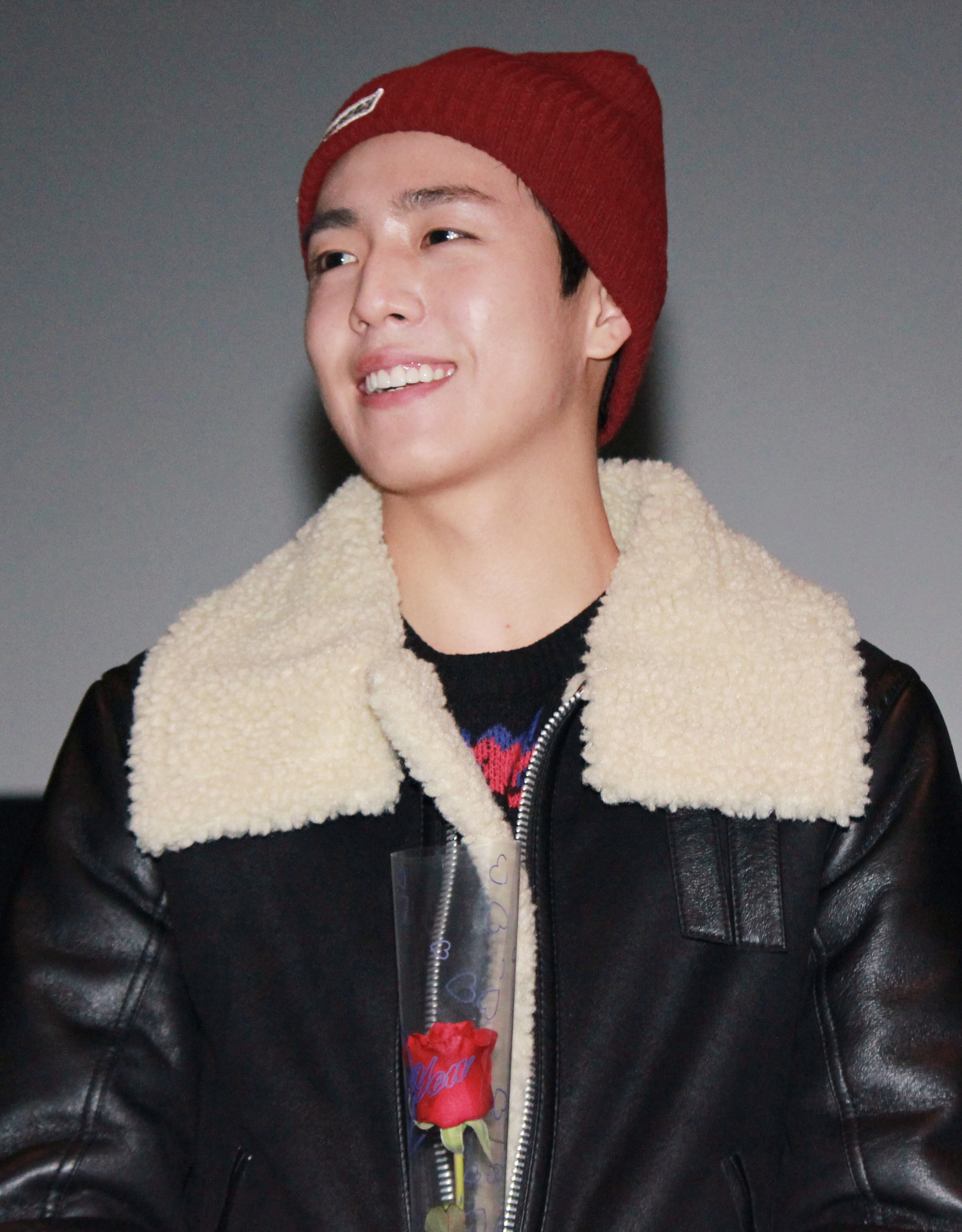 150103-기술자들-부산-무대인사-이현우